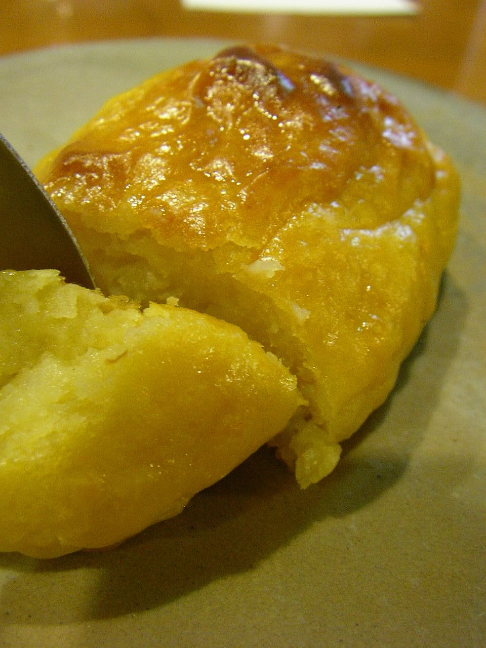 洋菓子スイートポテト